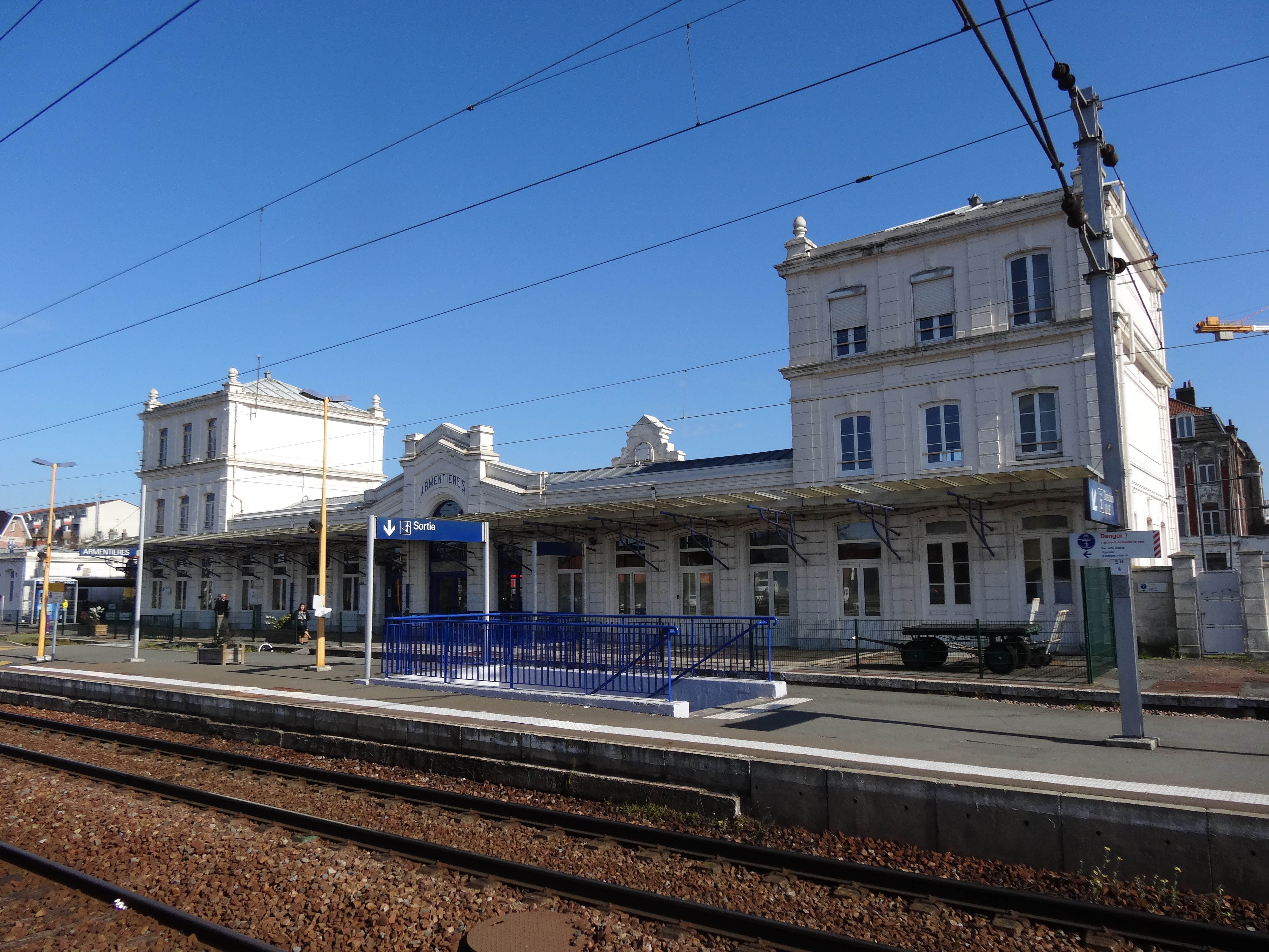 Gare d'Armentières, Nord, Nord-Pas-de-Calais, France.